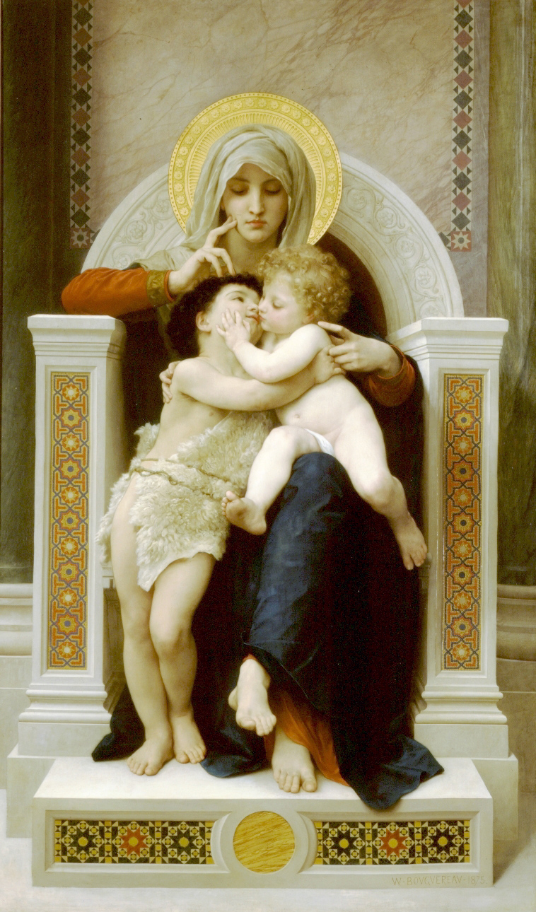 La Vierge, L'Enfant Jésus et Saint Jean-Baptiste (aka The Virgin, Jesus & Saint John Baptist)